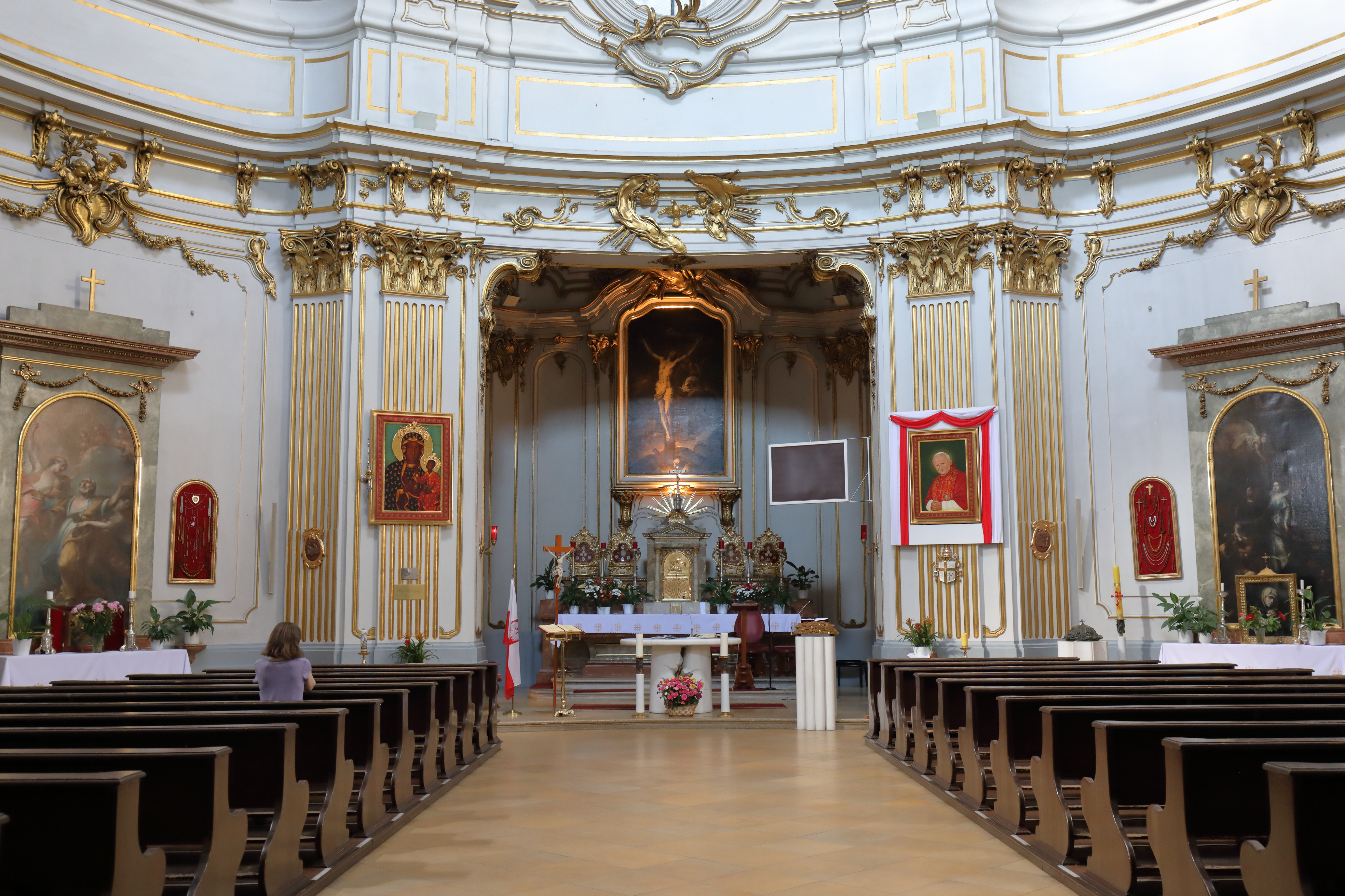 Innenansicht der Gardekirche am Rennweg im 3. Wiener Gemeindebezirk Landstraße.Unter Nikolaus Pacassi ab 1755 als Spitalskirche errichtet und am 1. November 1763. Joseph II. löste 1782 das Spital auf und quartierte die Polnische (Galizische) Leibgarde ein. 1897 wurde die Kirche den polnischen Resurrektionisten übergeben. Das Hochaltarbild „Christus am Kreuz" schuf Peter Strudel. Am 12. September 1983 wurde die Kirche von Papst Johannes II besucht, der die neue Kirchenorgel einweihte.